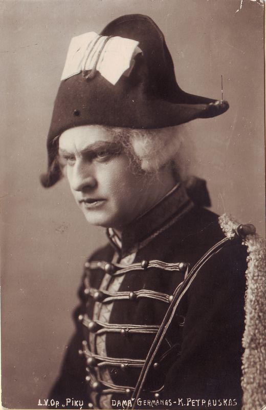 Kipras Petrauskas (1885 m. lapkričio 23 d. Ceikiniuose, Švenčionių apskritis, Rusijos imperija – 1968 m. sausio 17 d. Vilniuje) – žymus Lietuvos dainininkas (tenoras), operose sukūręs apie 80 vaidmenų, profesorius, Lietuvos meno kūrėjų draugijos narys. Su K. Petrausku siejamas nacionalinės operos įkūrimas. Fotografijoje - Germano vaidmuo Piotro Čaikovskio operoje "Pikų dama".